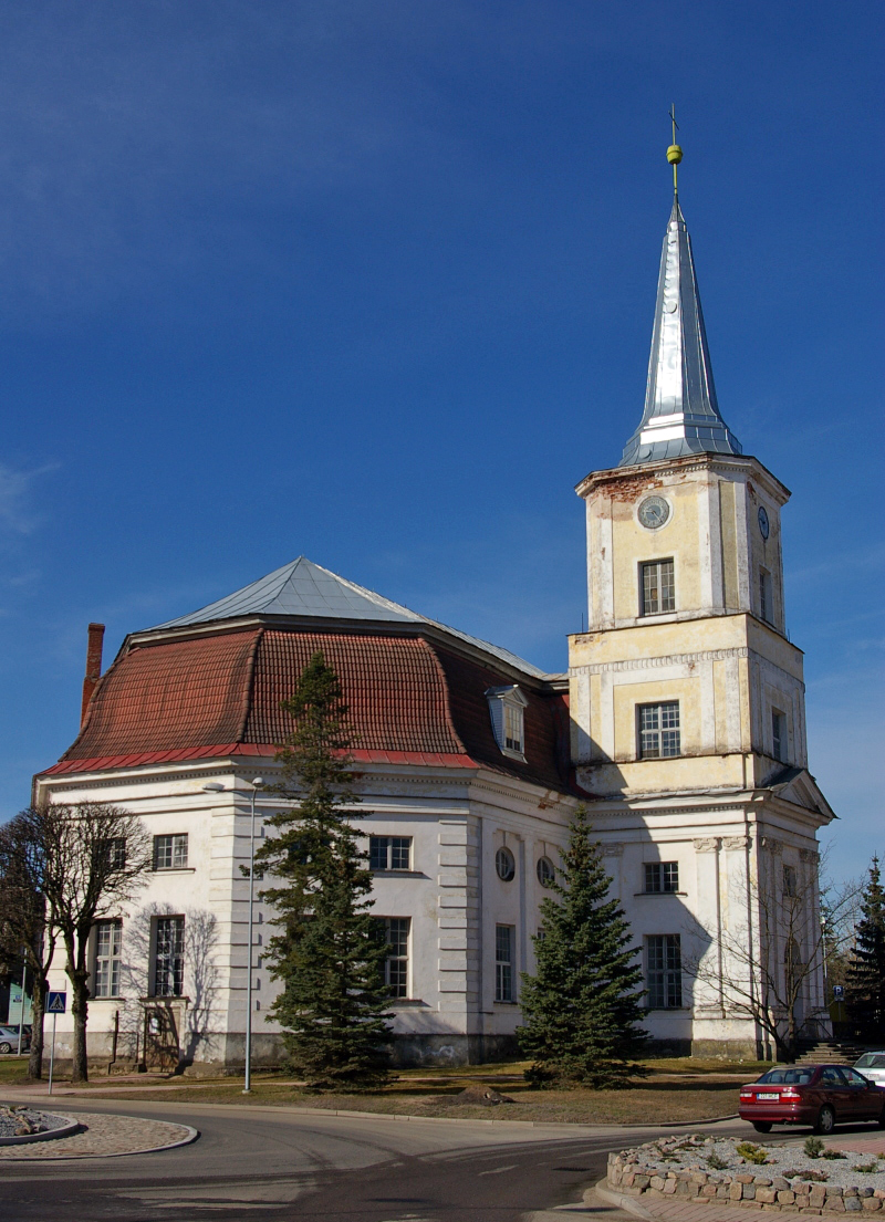 Valga Jaani kirik